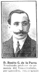 Retrato de Benito García de la Parra, obra del fotógrafo Manuel Compañy, en la revista Nuevo Mundo.